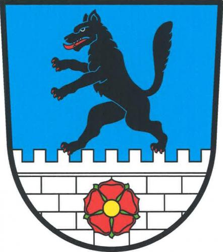 Kvítkov znak